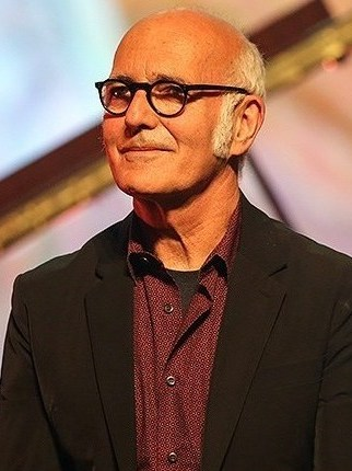 کنسرت لودویکو ایناودی